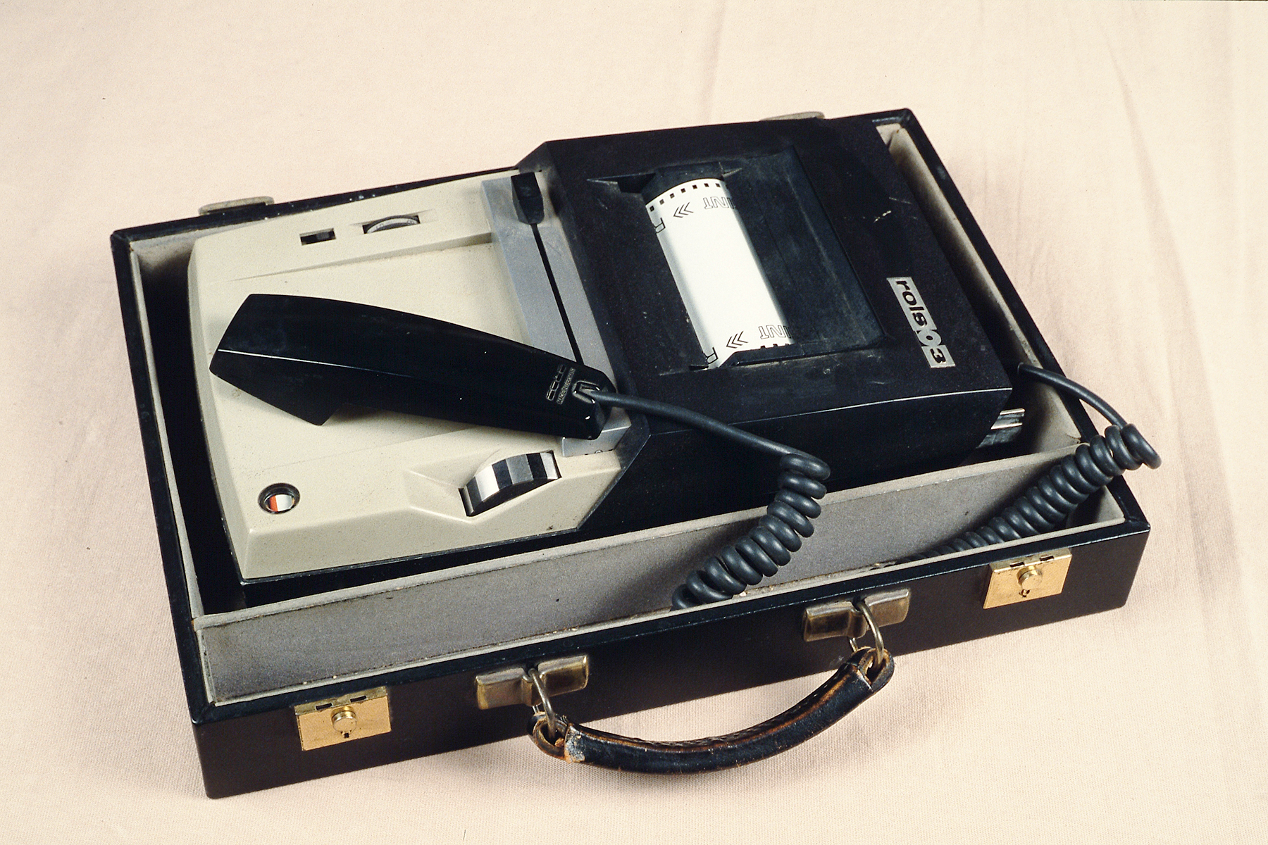 Objectgegevens Titel: Draagbaar dicteerapparaat “Rols 3” met losse microfoon in zwarte koffer Beschrijving: a. dicteerapparaat; b. losse microfoon; c. onderkant koffer; d. deksel koffer. Trefwoorden: dicteerapparaat, koffer, houder Opschrift / merk: "Rols 3" enz. Vervaardiger: Apparatebau Stellingen GmbH Plaats vervaardiging: Duitsland, Hamburg Datering: 1964 - 1975 Materiaal: kunststof, vilt, rubber, metaal, leer, karton Afmetingen: (cm) koffer: hg 26,0 / br 33,8 / dp 8,6 Associatie: bedrijf, kantoor, secretaresse, mobiel, Rotterdam, Stadscentrum, Stadsdriehoek, Goudsesingel, Veenman Inventarisnr: Museum Rotterdam 75310-A-D